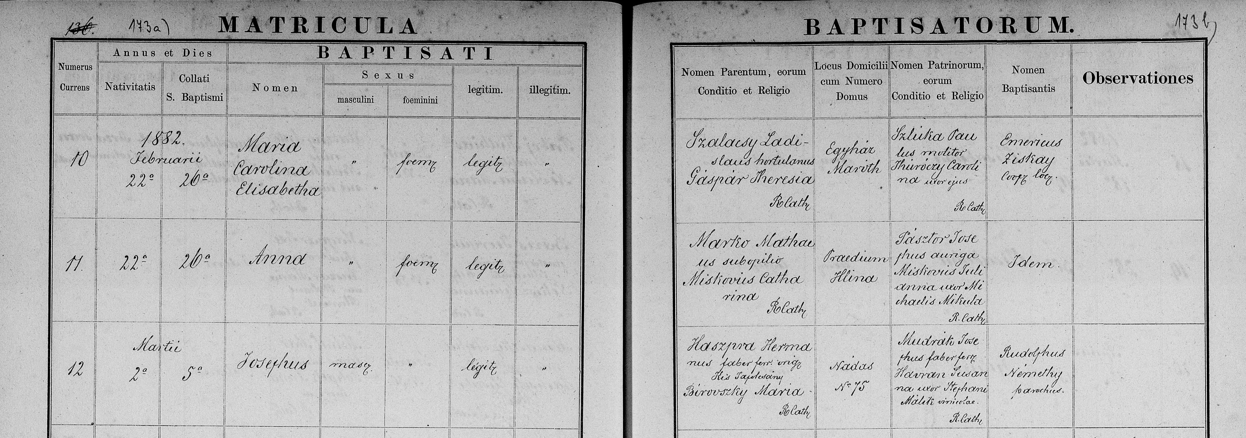 Matriční zápis o narození a křtu Josefa Haszpry (Hontianske Trsťany Baptisms (Krsty) 1880-1895)